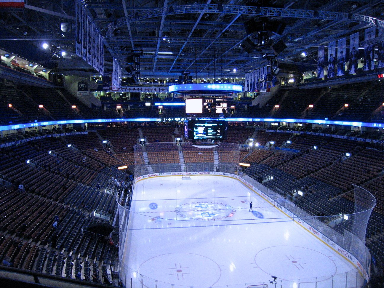 Visite à Toronto en 2007